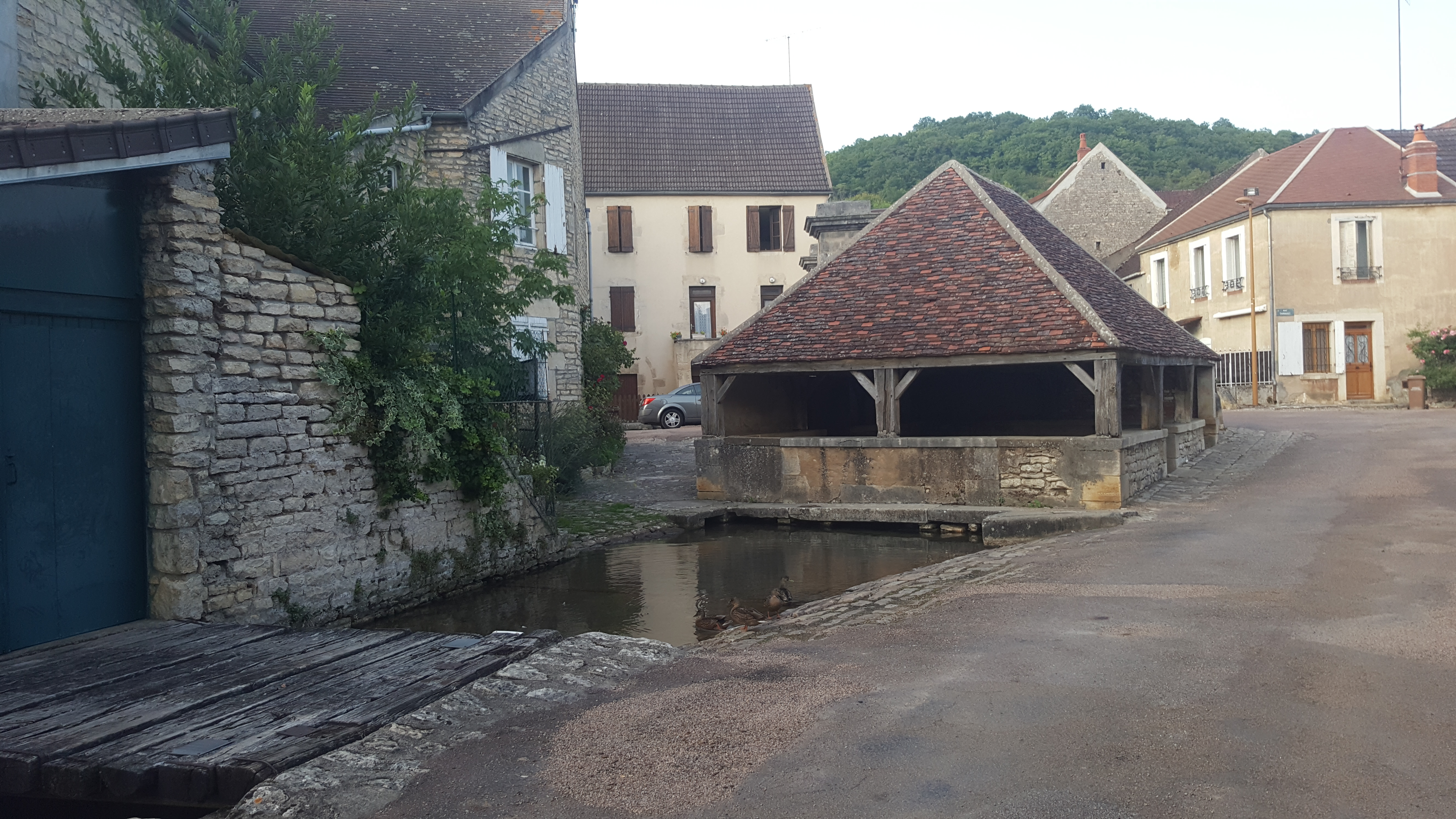 Photo du lavoir de Dornecy situé rue des Fontaines